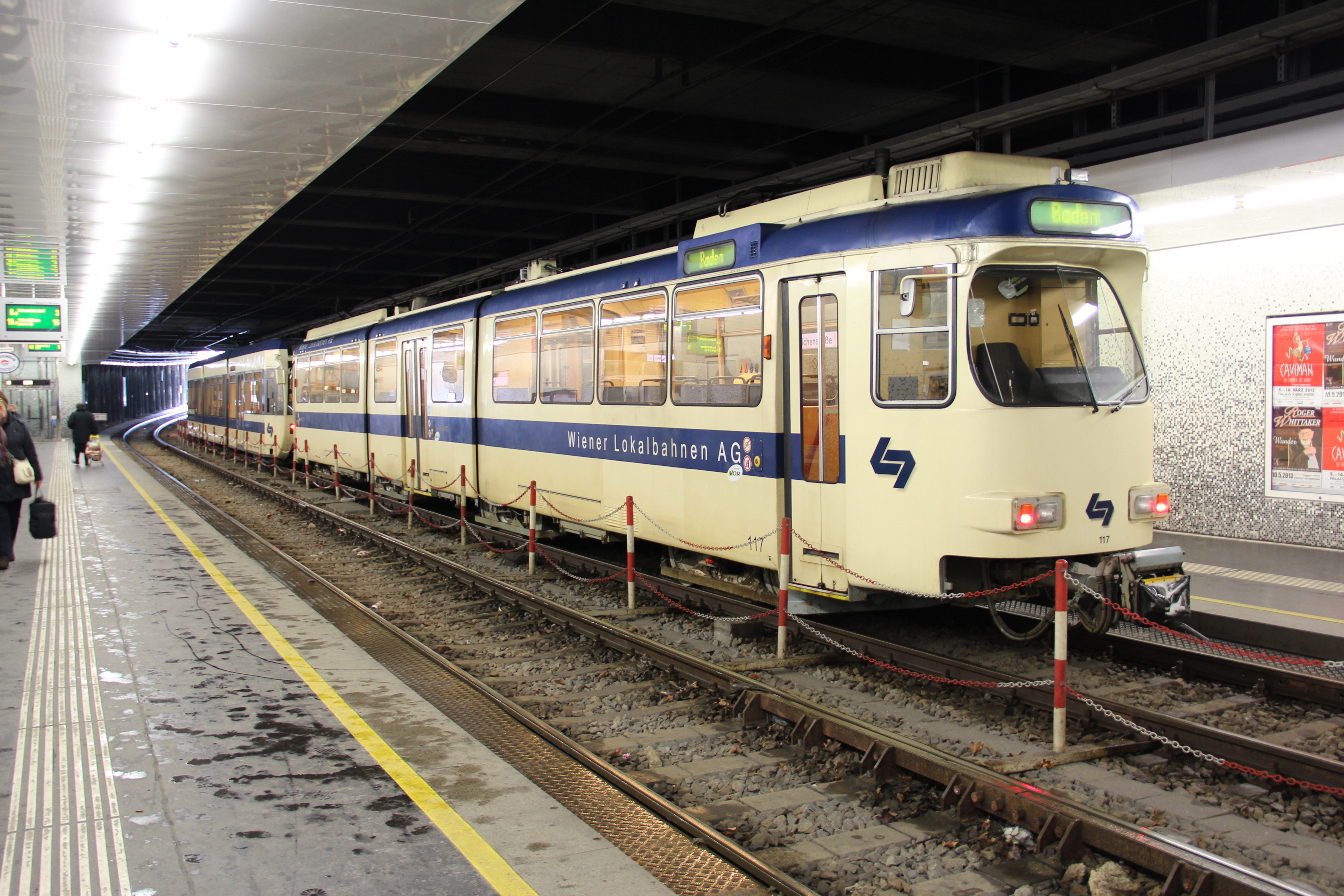 WLBZug (Doppelgarnitur 4xx + 117) am Weg von Kärntner Ring, Oper nach Baden, Josefsplatz in der Ustrab-Haltestelle Eichenstraße